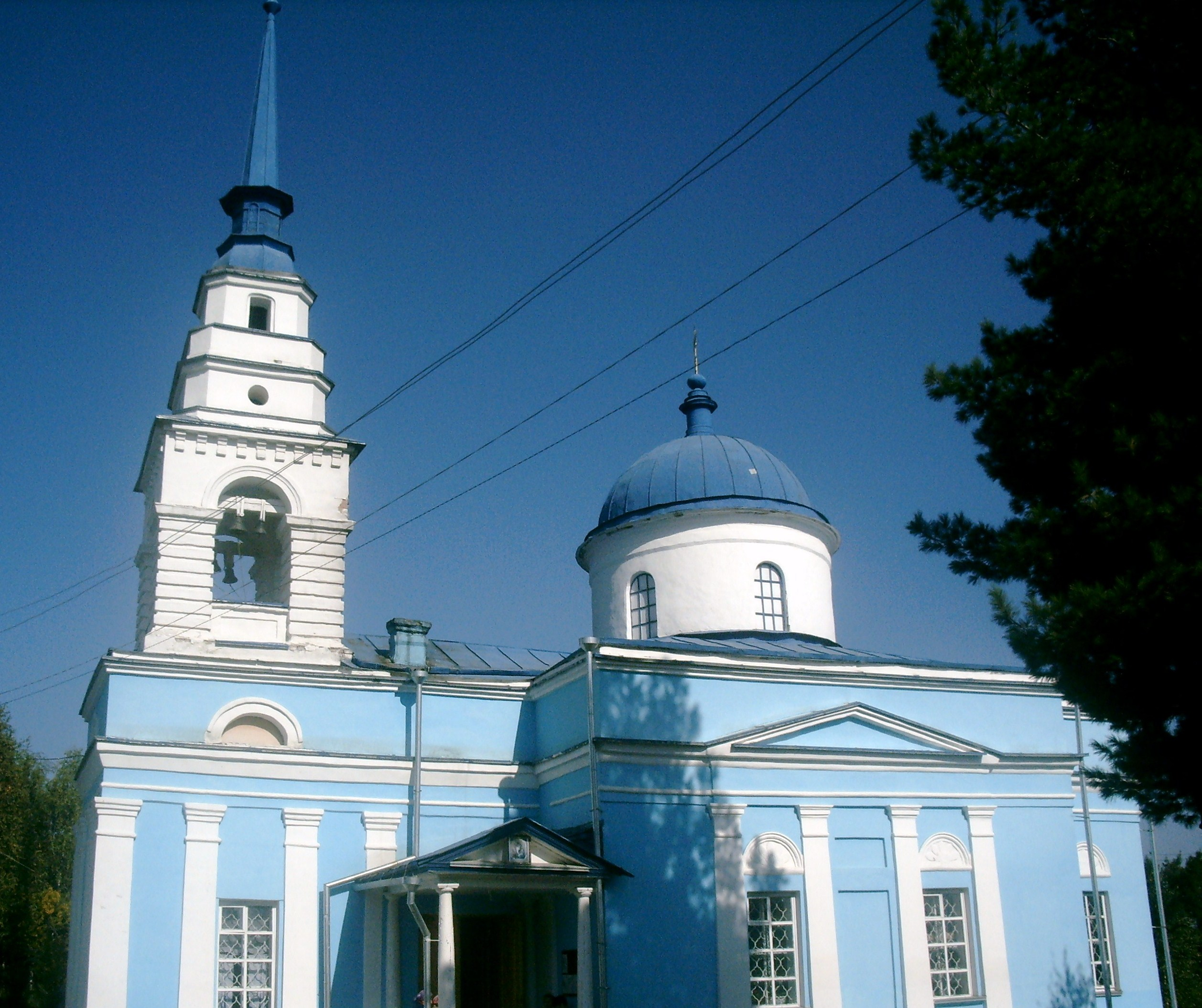 Церковь Во имя Казанской иконы Божией Матери в городе Карпинске